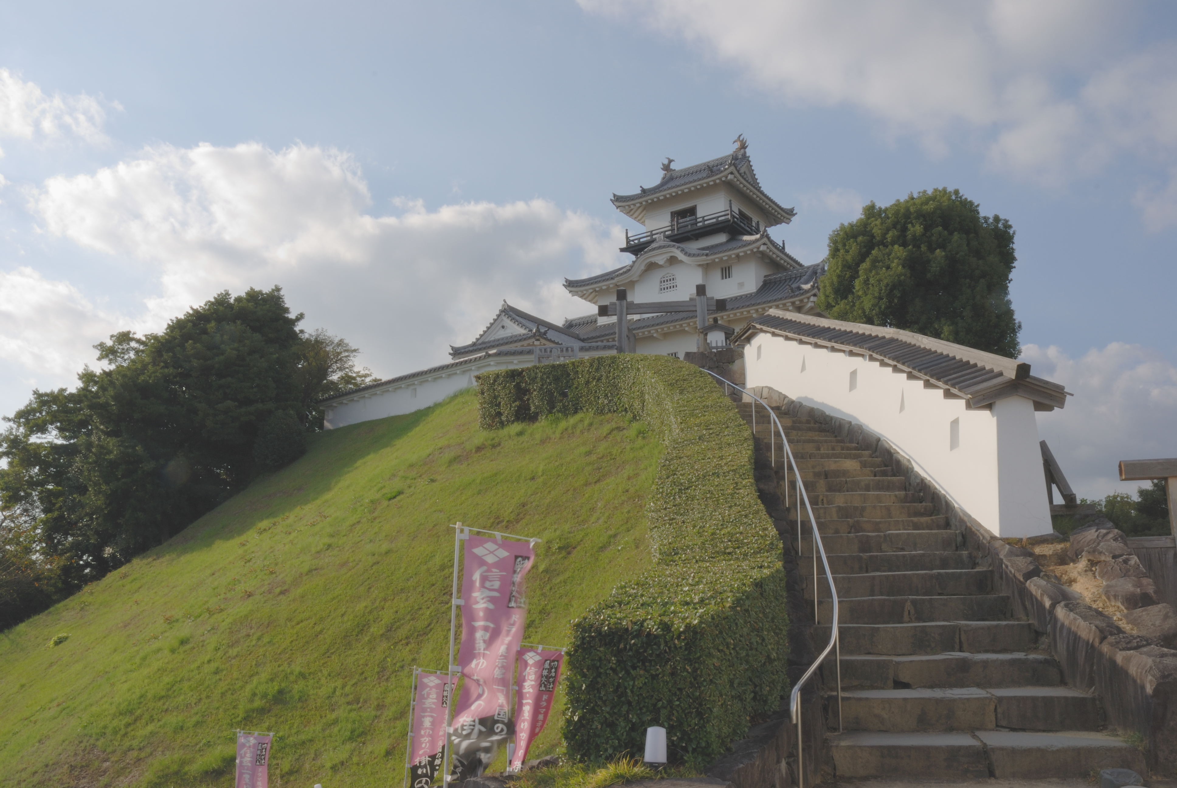 tenshu